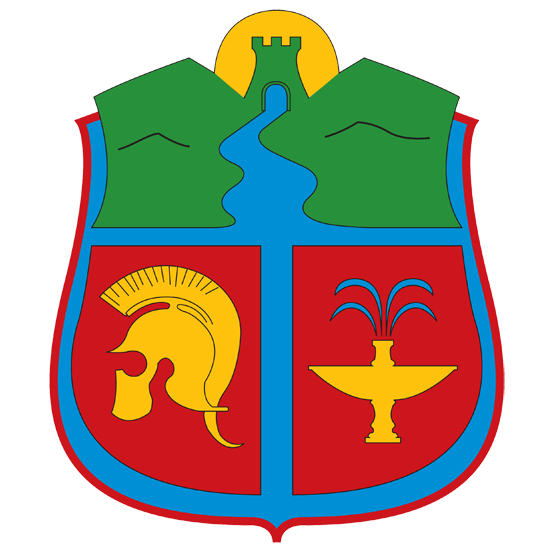 Wappen Zajecar